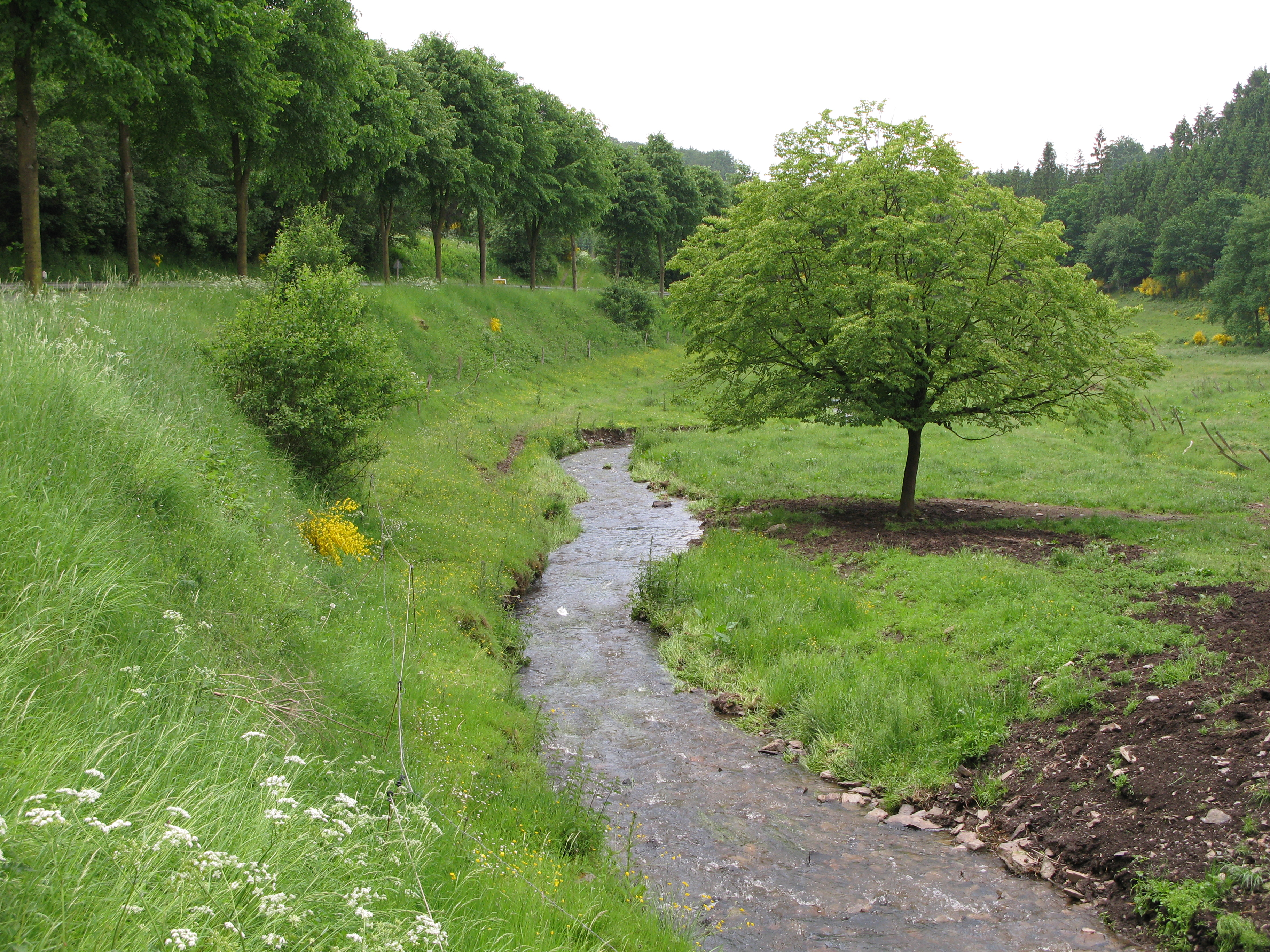 D'Wemperbaach op der Holler Millen. Kategorie:Baachen zu Lëtzebuerg